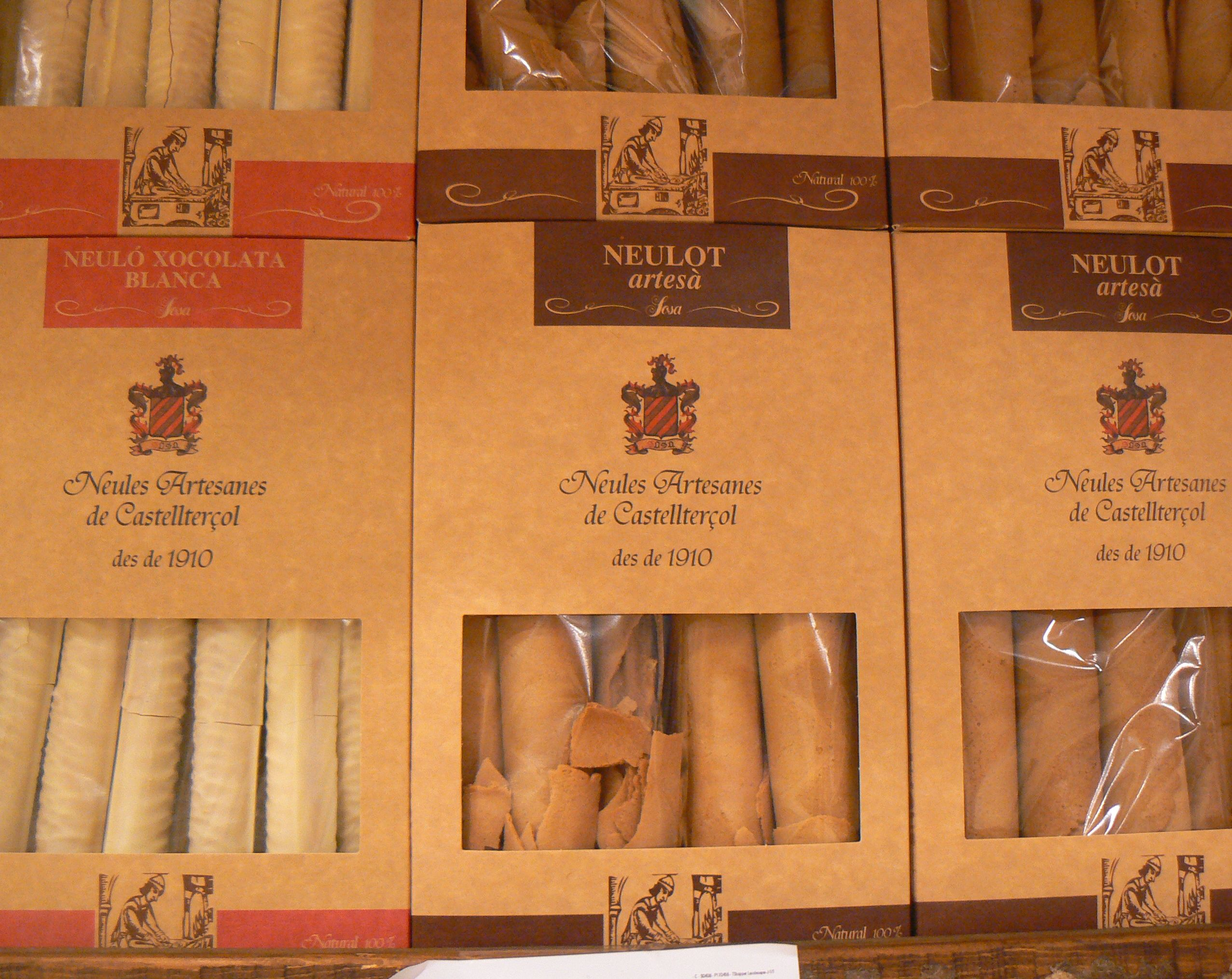 Les neules són tradicionals al Nadal a Catalunya. Recentment s'han incorporat al mercat noves versions, amb xocolata blanca i amb xocolata negra.